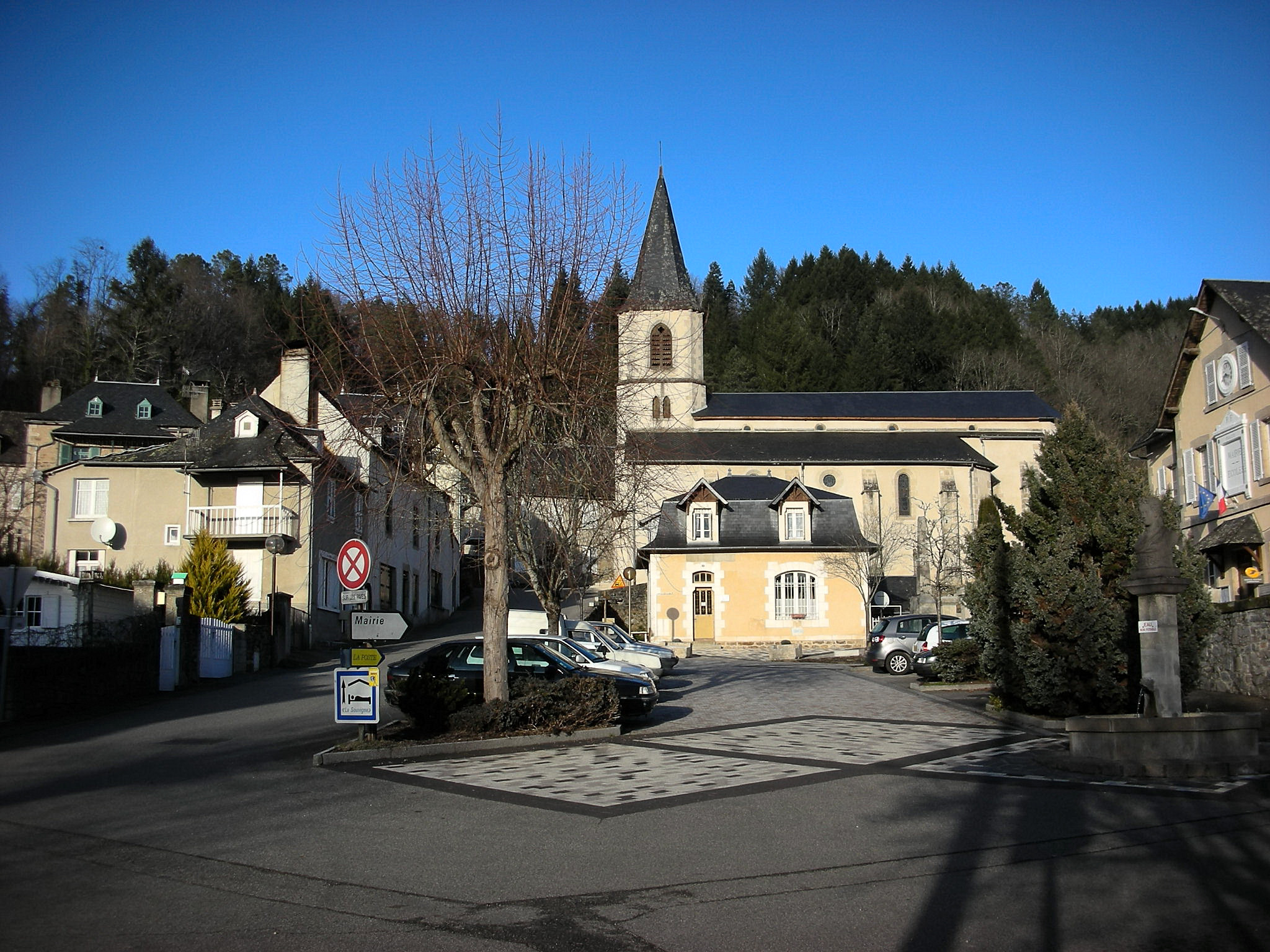 Forgès (French village)